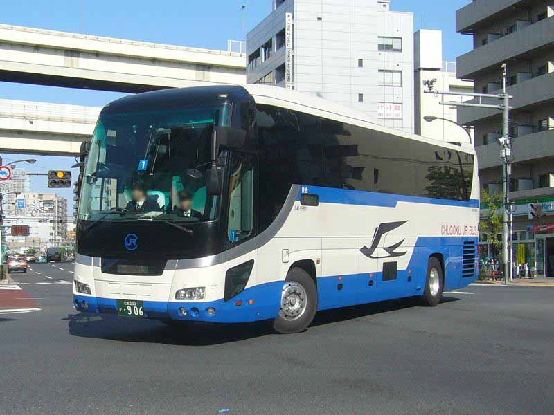 登録番号 広島200か・906 中国ジェイアールバス（Chugoku JR Bus Company）広島支店所属 車番641-6903 夜行用車両 （各系統で共通運用） いすゞ・ガーラ PKG-RU1ESAJ